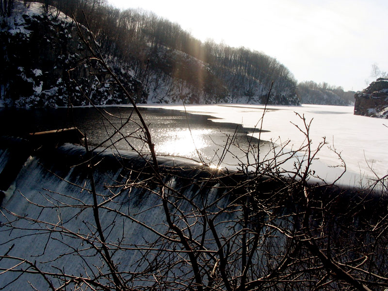 ріка Тетерів, м. Житомир